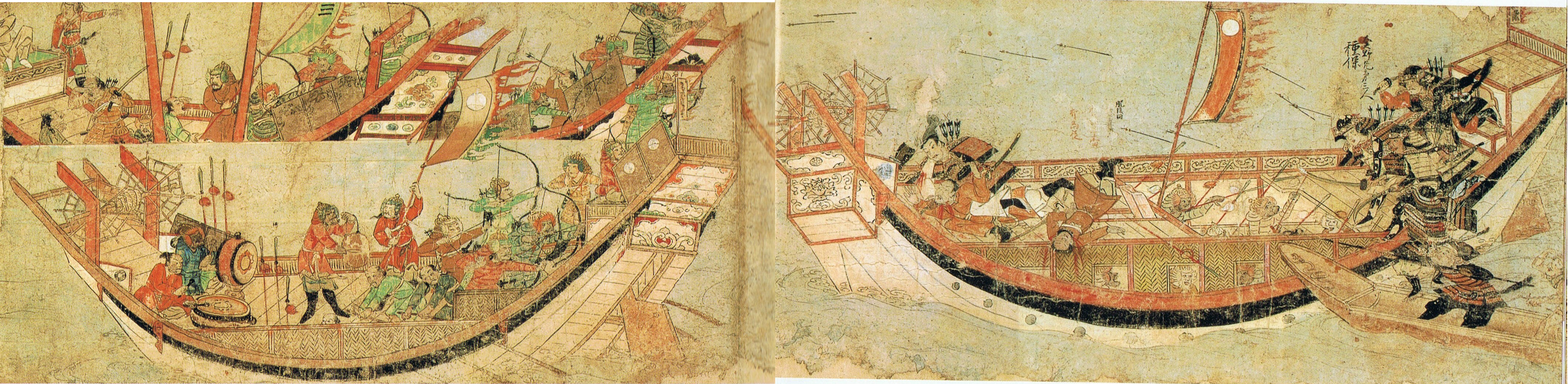 『蒙古襲来絵詞』後巻、絵十六【弘安の役】敵船に乗り込む竹崎季長と大矢野三兄弟、応戦する敵船。